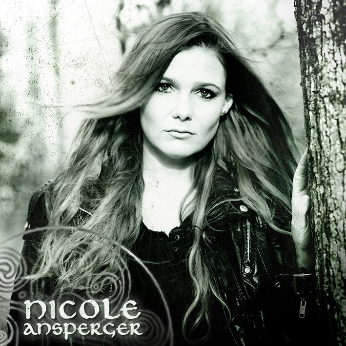 Nicole Ansperger (Pressefoto 2015)